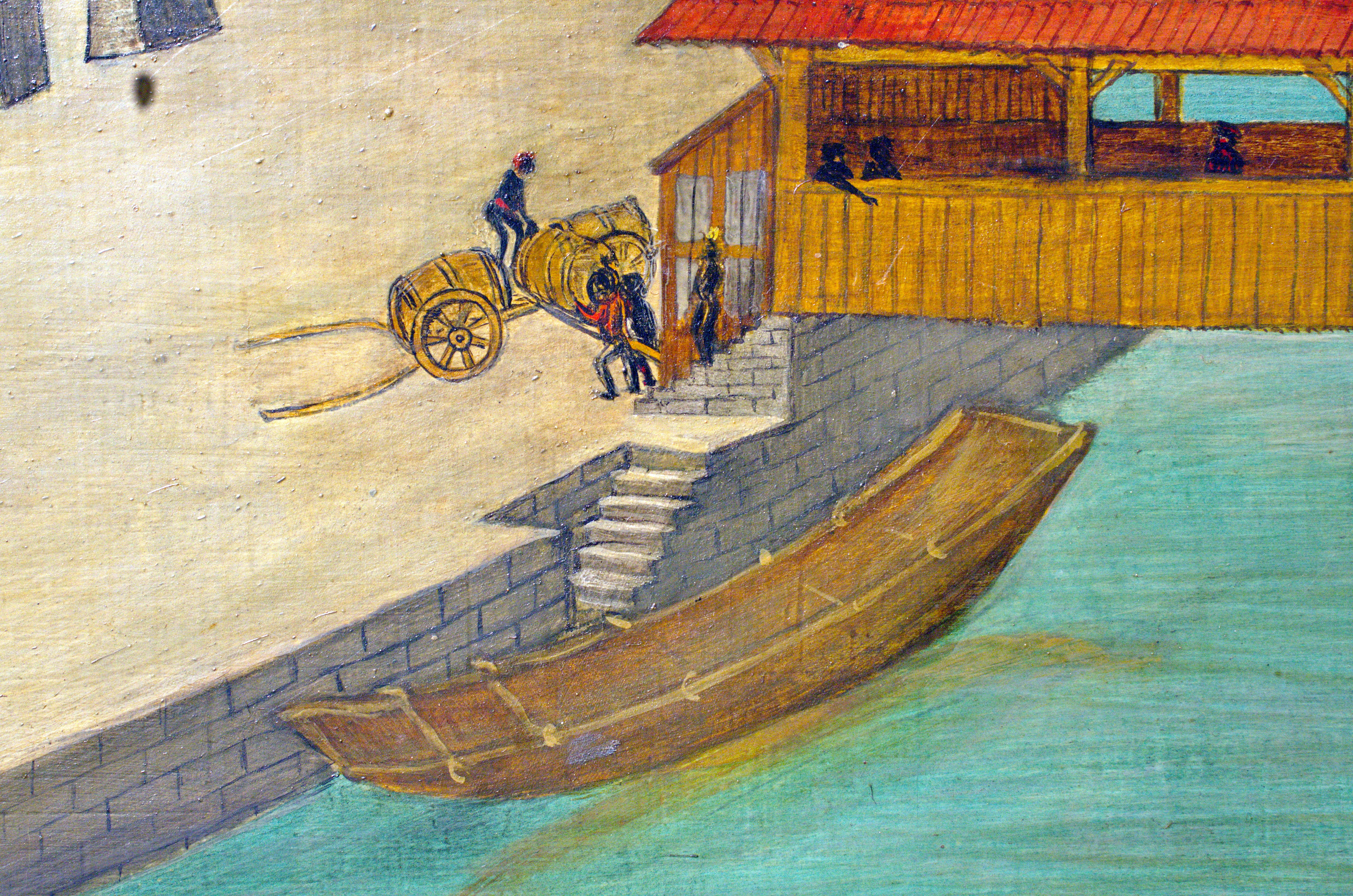 Ein Weidling auf der Replik der Altartafeln von Hans Leu im Baugeschichtlichen Archiv der Stadt Zürich im Haus zum Rech. Die Panoramansicht des linksseitigen Limmatufers – 'Standort' der BetrachterIn ist wohl der Karlsturm des Grossmünsters – von Hans Leu d. Ä. gilt als die älteste zuverlässige Darstellung der Stadt Zürich, Ende des 15. Jahrhunderts auf den Altartafeln im Grossmünster mit viel Liebe zum Detail festgehalten. Die originalen Tafeln sind heute im Landesmuseum ausgestellt, eine (vermutlich) 1:1 Replik ist im Stadtarchiv öffentlich zugänglich.